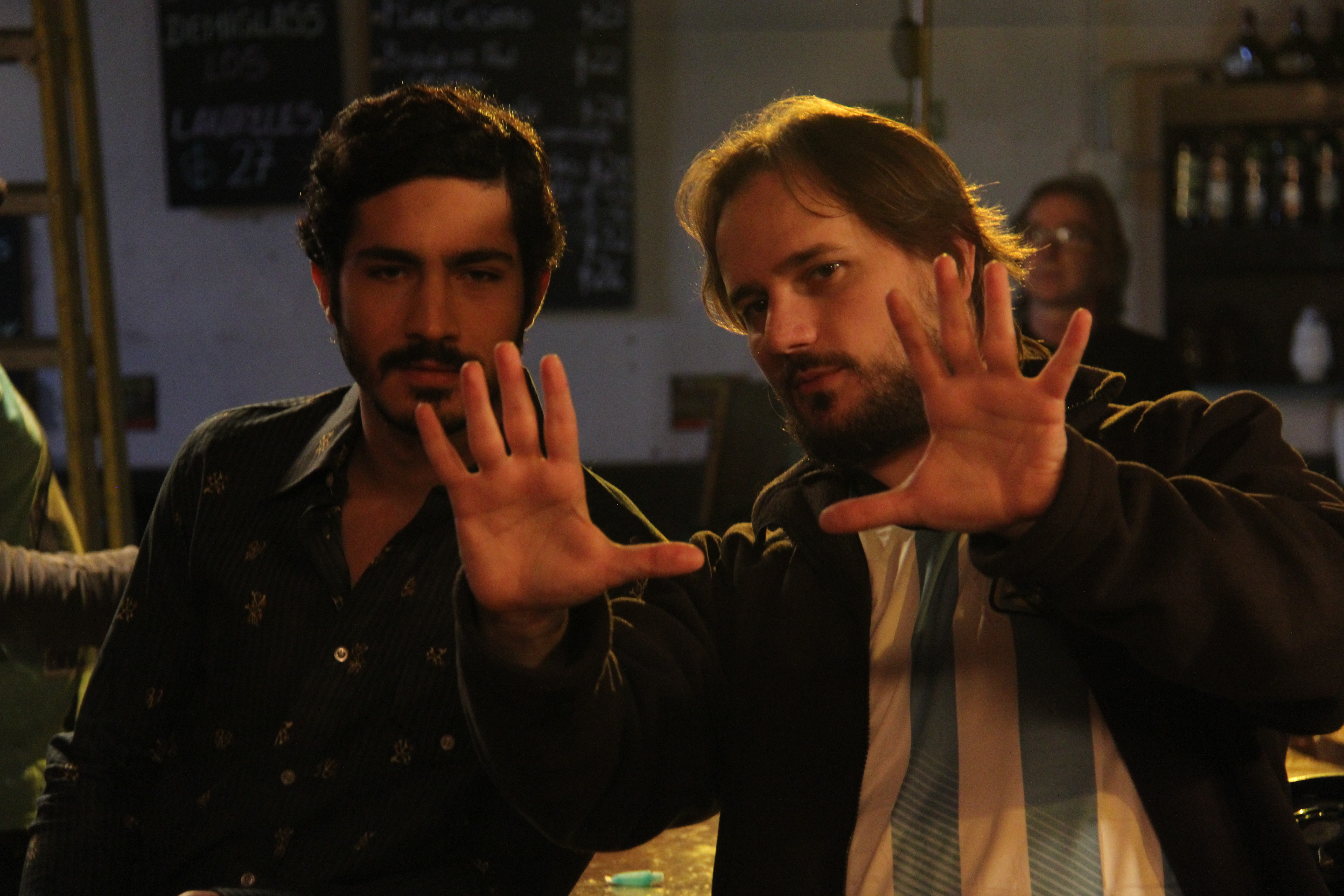 Corsini dirigiendo al Chino Darín